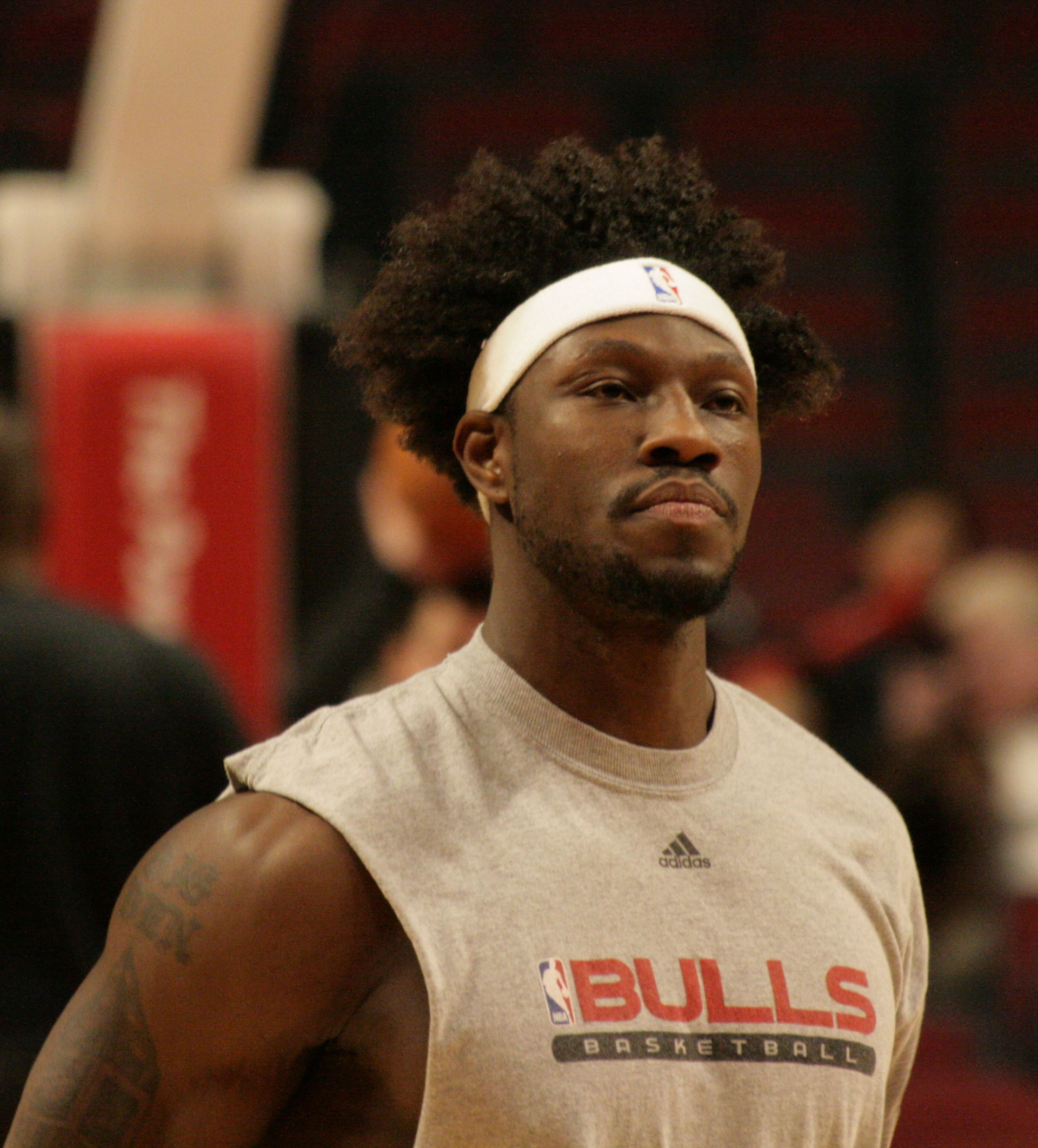 BIG Ben Wallace